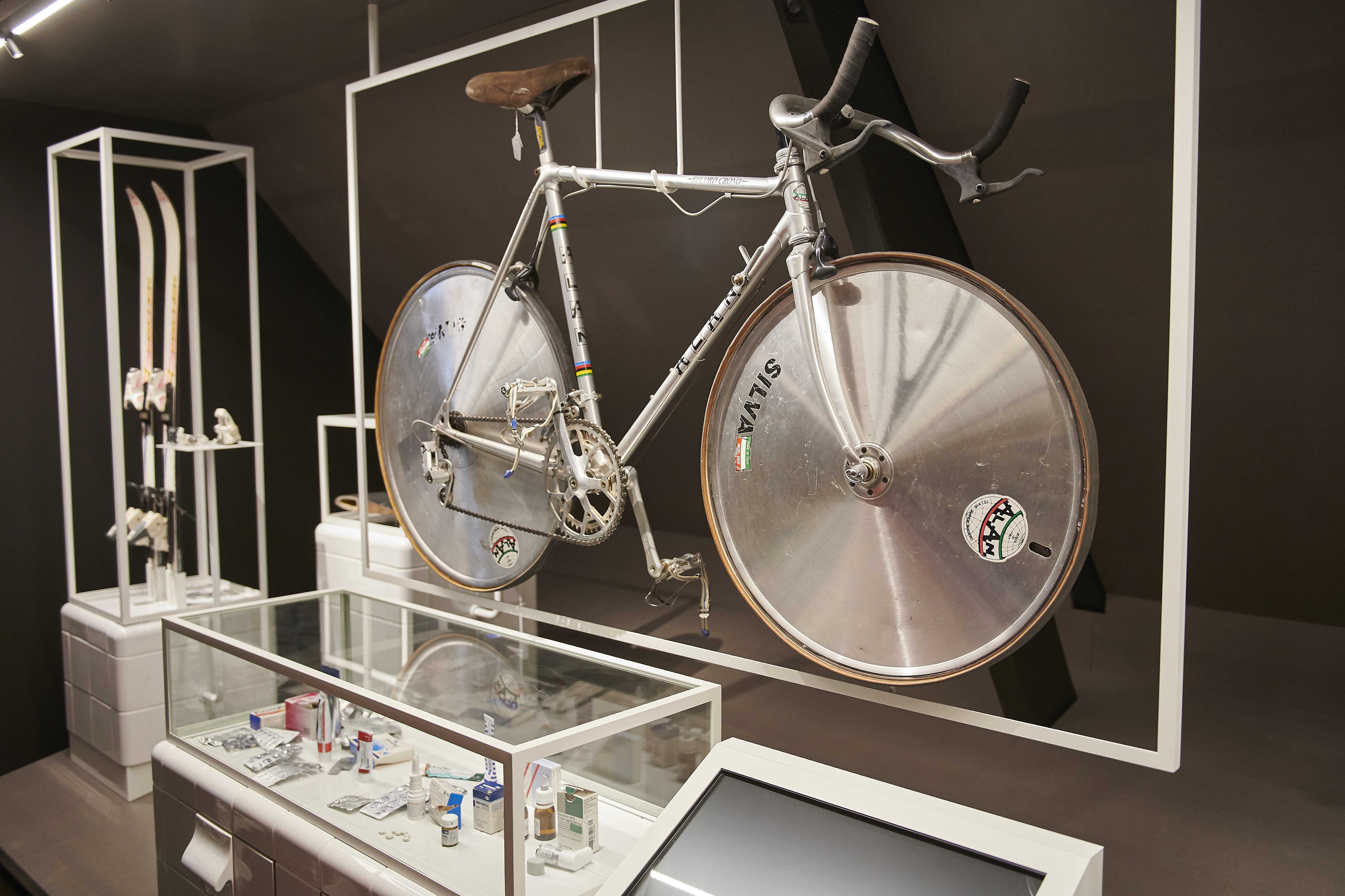 KOERS is wetenschap (onderdeel presentatie in KOERS. Museum van de Wielersport)